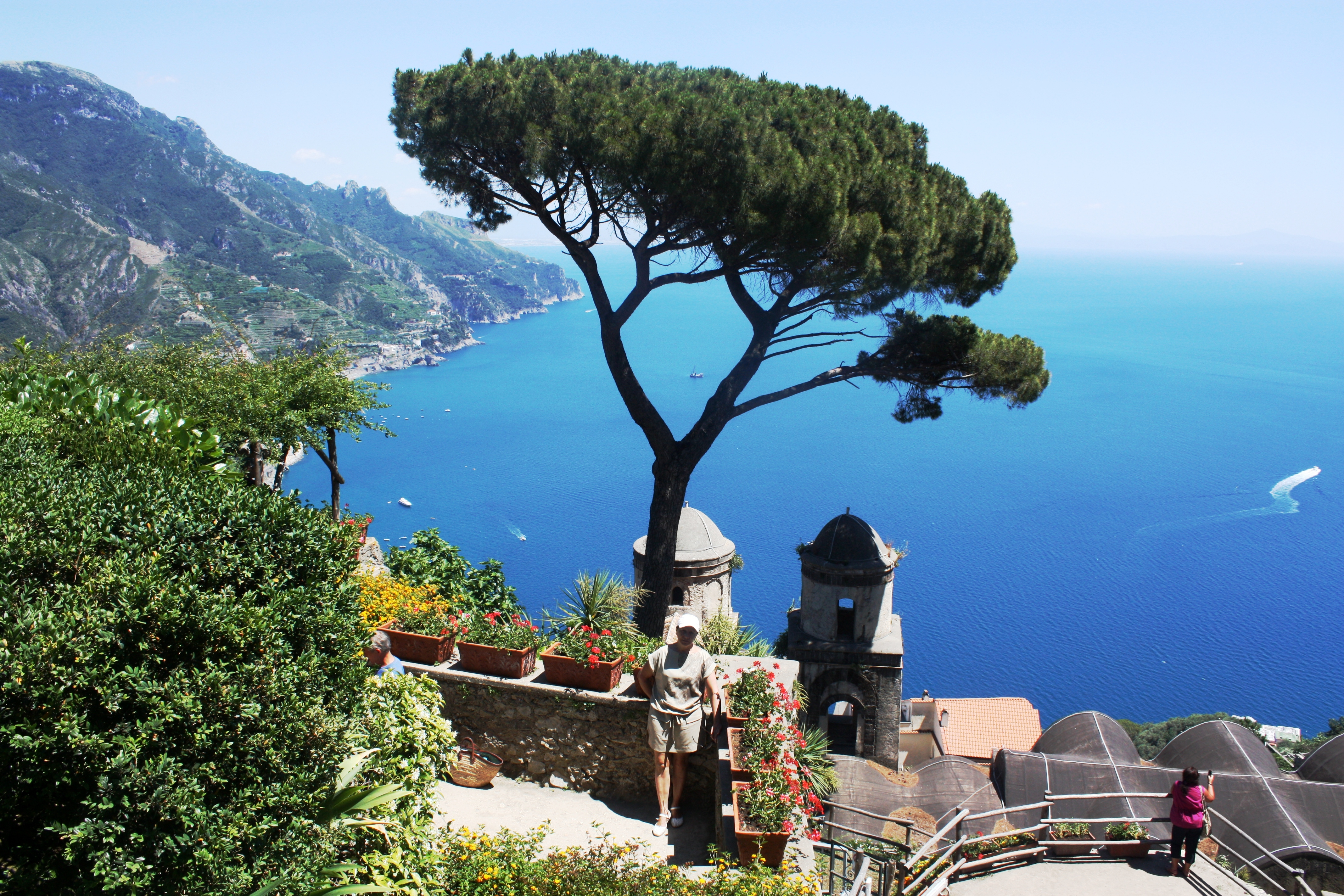 Ravello, Villa Rufolo